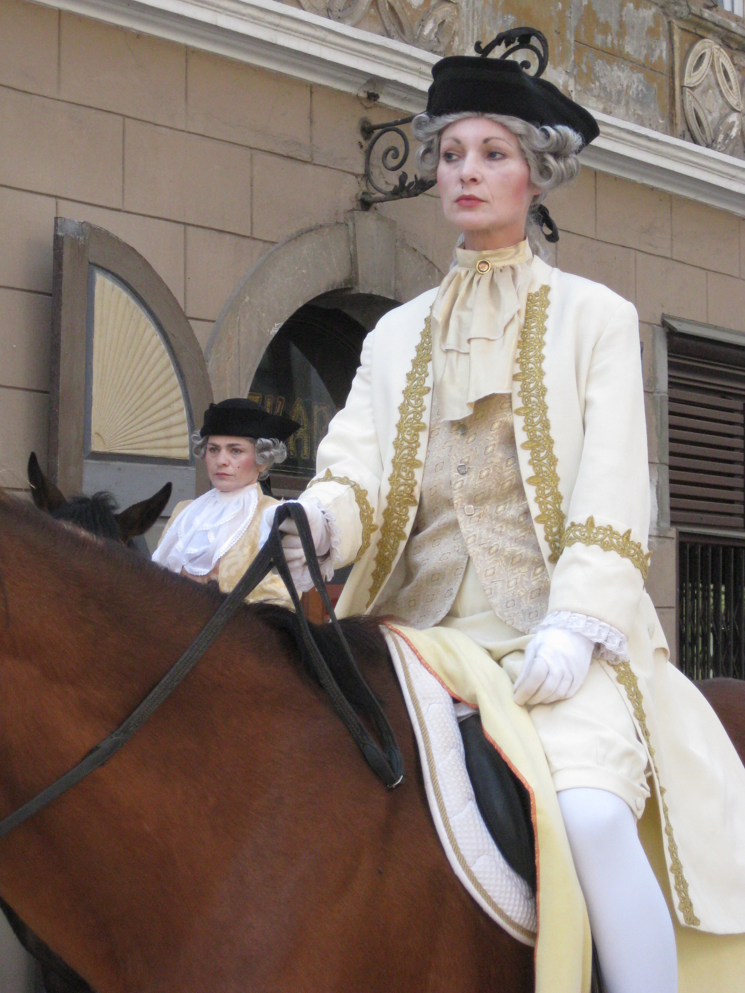 Škofjeloški pasijon (Processio Locopolitana), izvedba 2009 v Škofji Loki